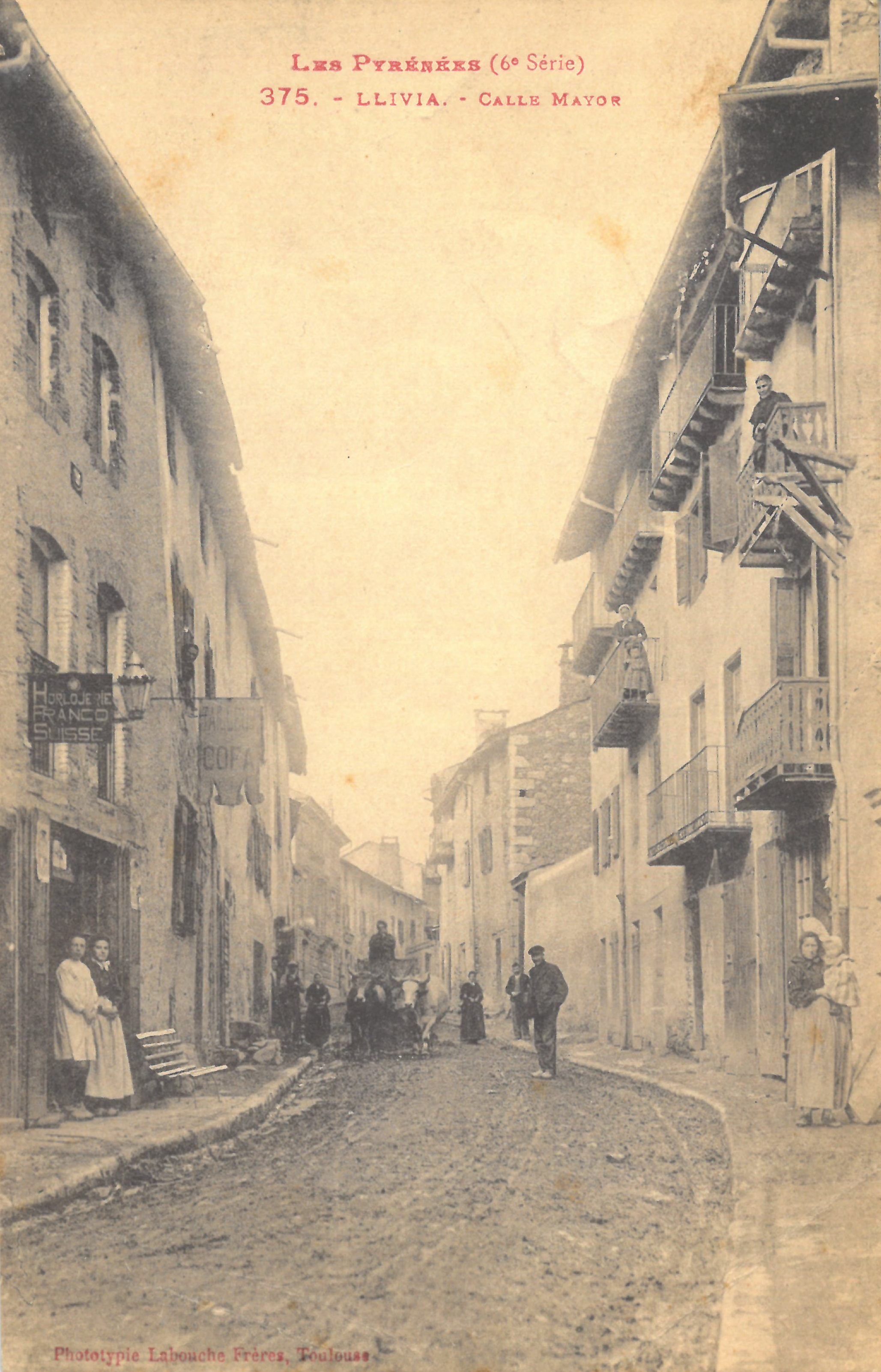 Llívia : Calle Mayor. Carte postale envoyée le 26 août 1933. Phototypie Labouche frères, Toulouse.